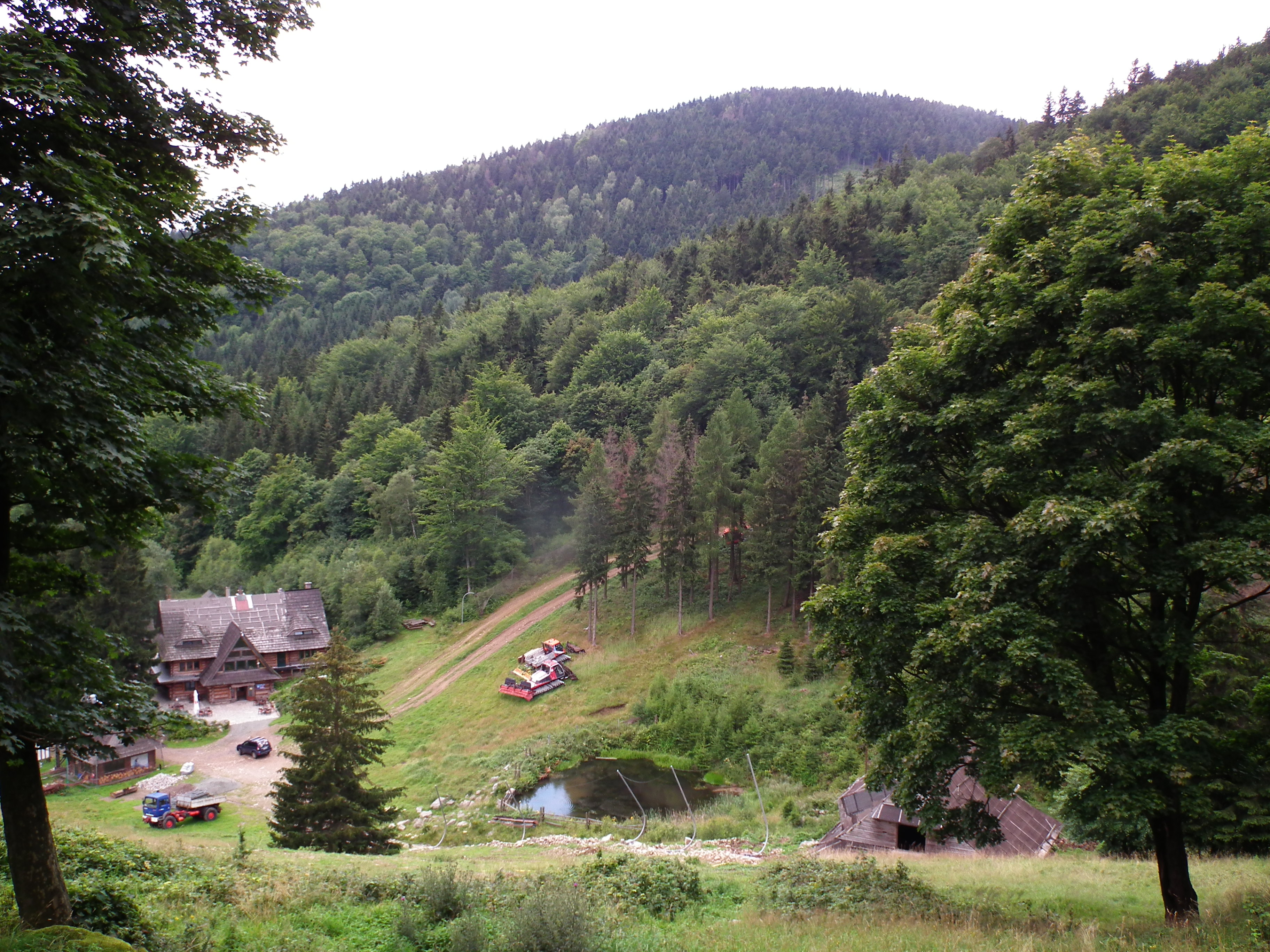 Koziołki widziane spod Zygmuntówki - Góry Sowie.